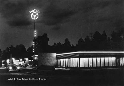 Motell "Gyllene Ratten" utanför Stockholm